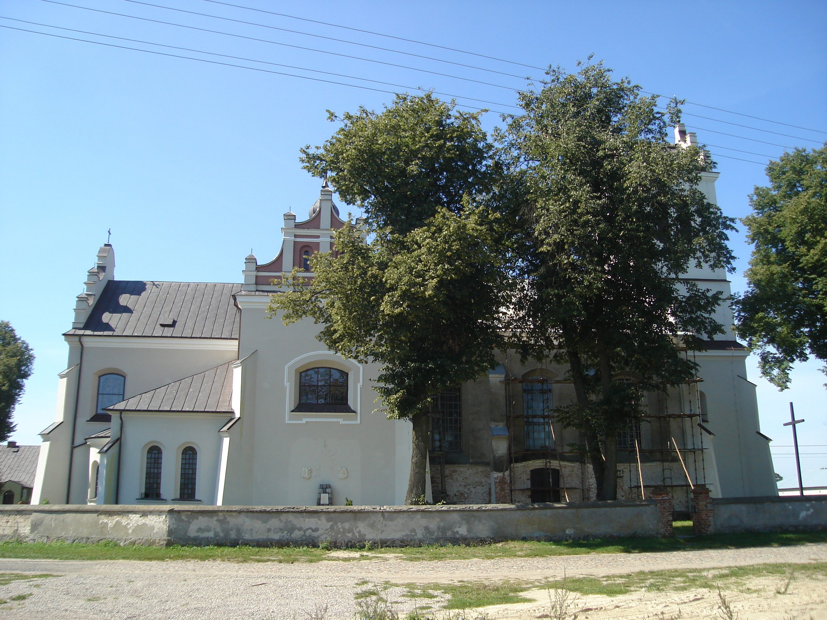 Kościół w Sieluniu. Widok z boku.